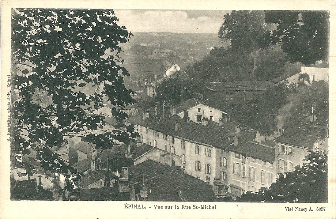 Epinal - Vue sur la Rue Saint-Michel - avant 1925